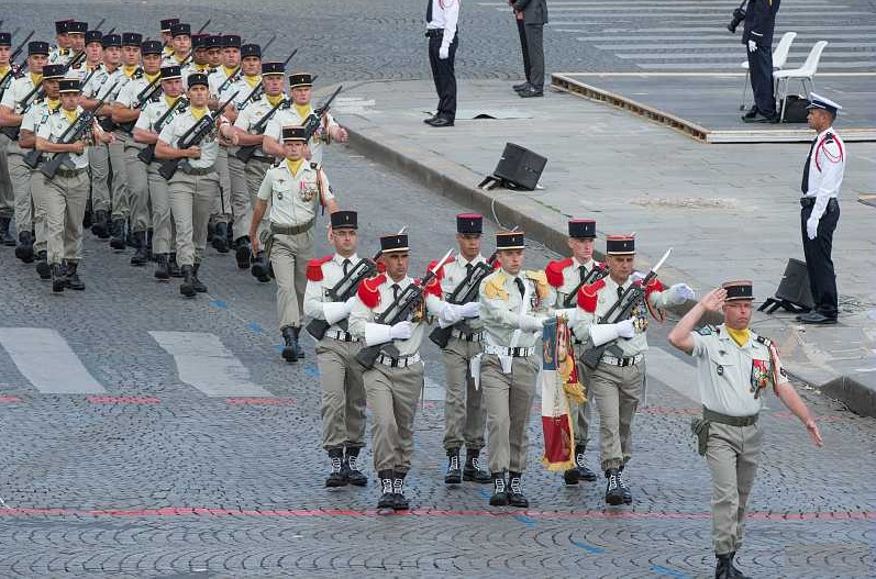 Défilé du Régiment (CDC, garde au Drapeau et 3e compagnie) sur les Champs Elysées le 14 juillet 2016